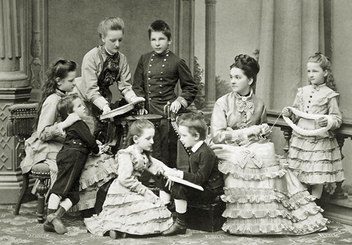 Portret zbiorowy dzieci Ludwika i Marii Sułkowskich (Antonina, Gabriela, Paulina, Taida, Wanda, Edgar, Stanisław, Wiktor. Na fotografii brak Ludwika, Alfreda i Aleksandra Edwarda), atelier Roberta Schreinzera (?), Biała, ok. 1875-1877 r. (za zgodą i ze zbiorów Muzeum Historycznego w Bielsku-Białej / With permission and from the collection of Historical Museum in Bielsko-Biała)